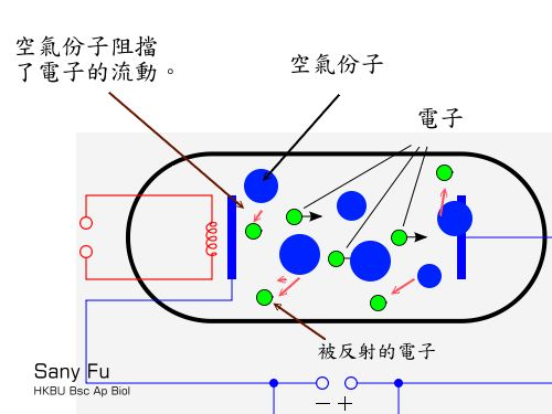 真空管內的空氣阻擋電子流動.